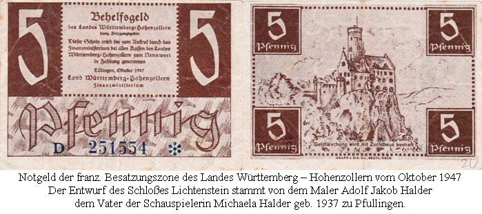 5-Pf.-Notgeld der franz. Besatzungszone des Landes Württemberg-Hohenzollern vom Oktober 1947. Motiv Schloß Lichtenstein/Schwäbische Alb